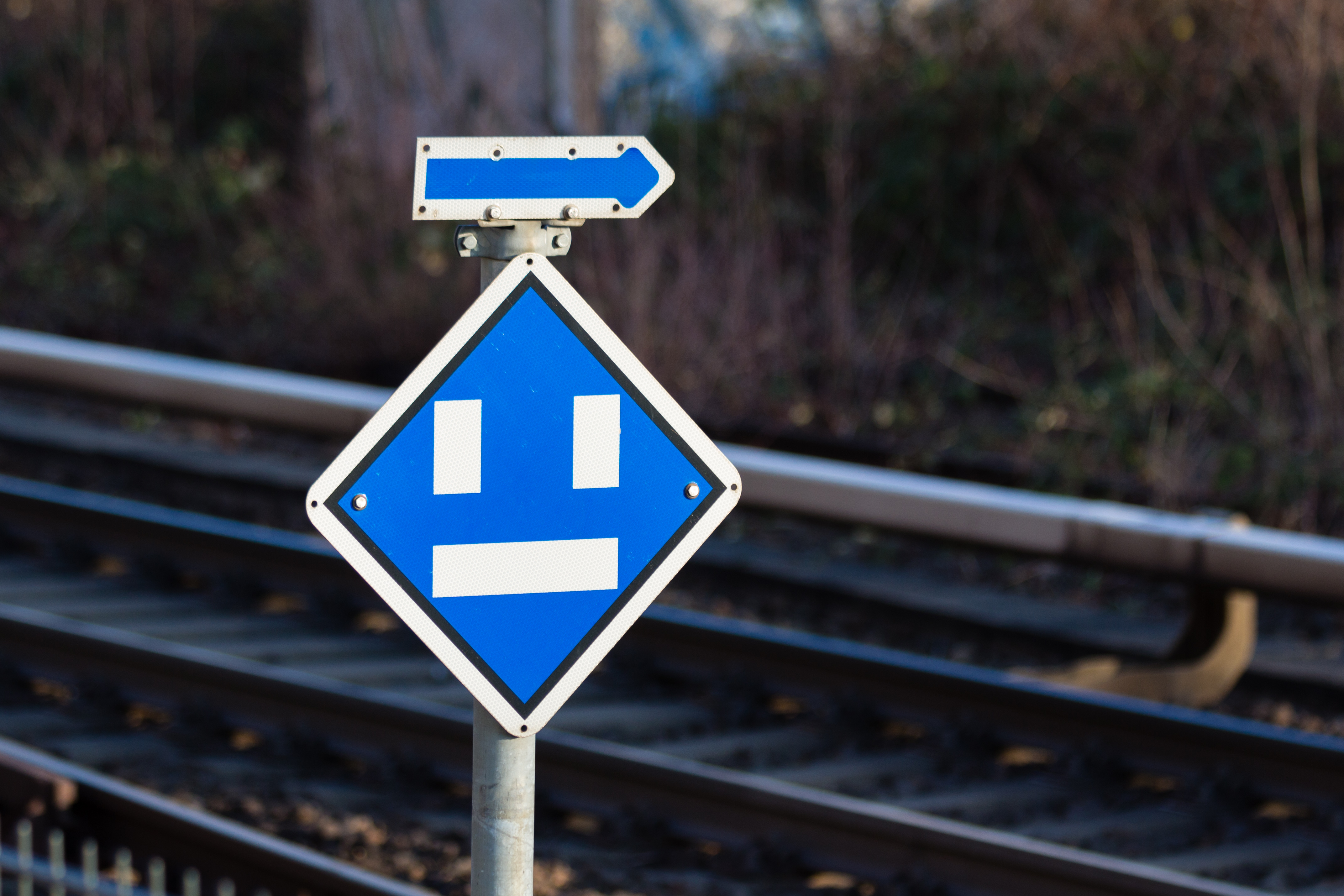 Signal El 1 (Ausschaltsignal) mit Zuordnungspfeil an der Dresdner Bahn in Berlin-Schöneberg.